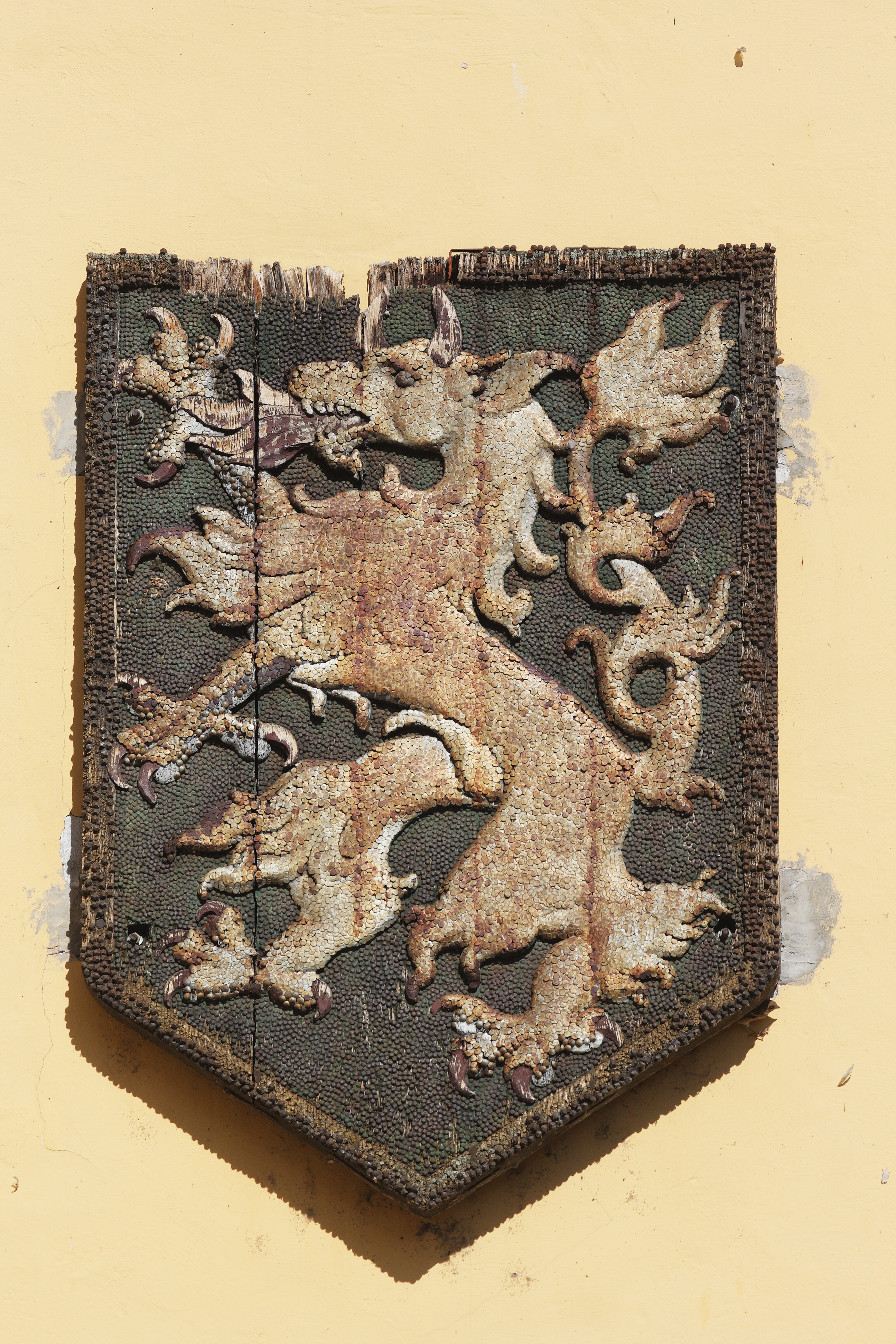 Der Eiserne Panther von 1915 am Steyrer Wasserturm. Das Holzmodell stammt von Leo Zimpel (1860-1923)